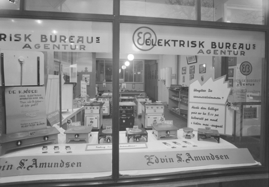 Elektrisk Bureau v/ Amundsen. Vinduer og utstillingslokale i Fjordgata 25, Trondheim, Norge. 1938